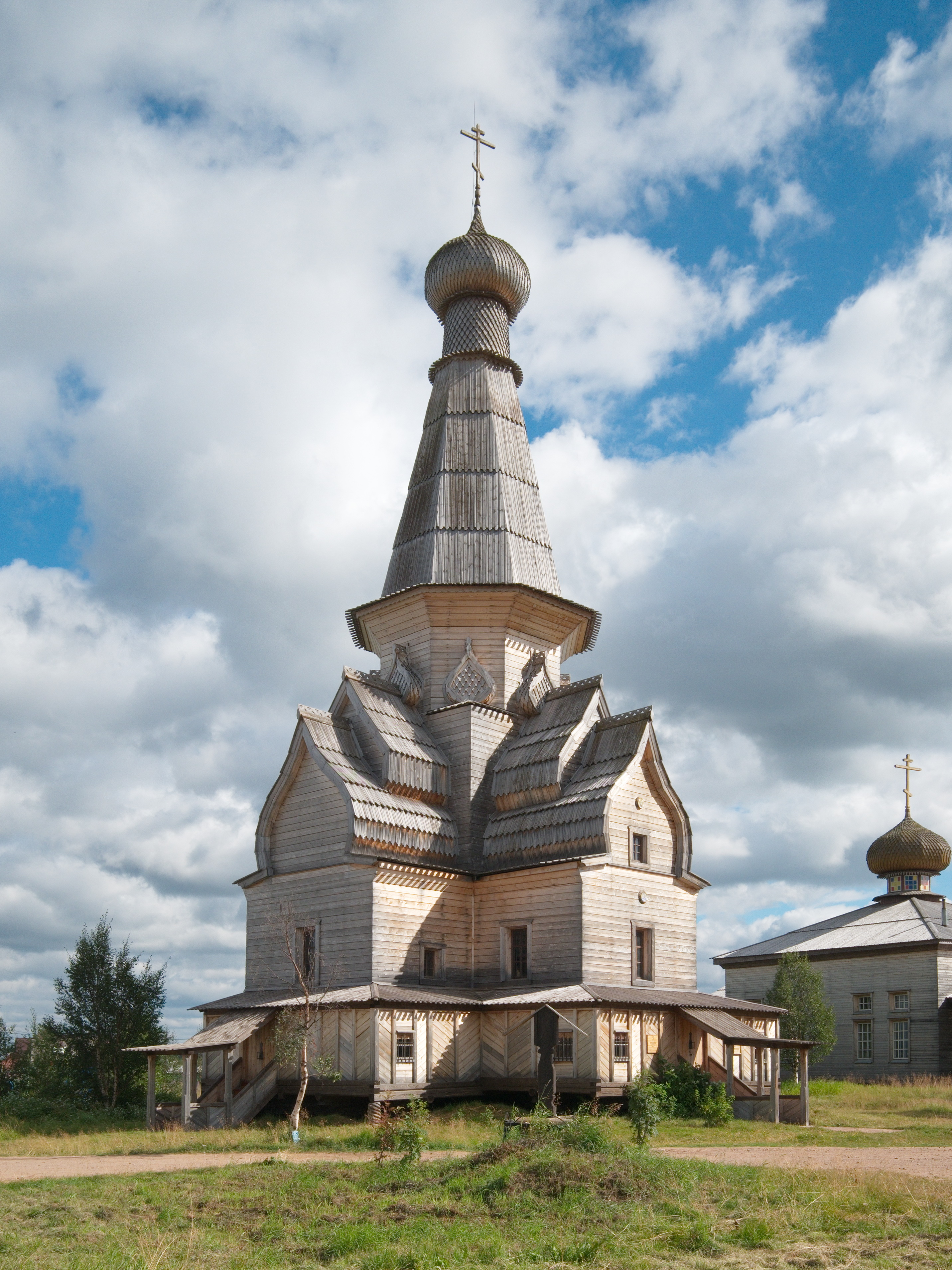 Церковь Успения (деревянная): улица Успенская, Варзуга, Терский район, Мурманская область